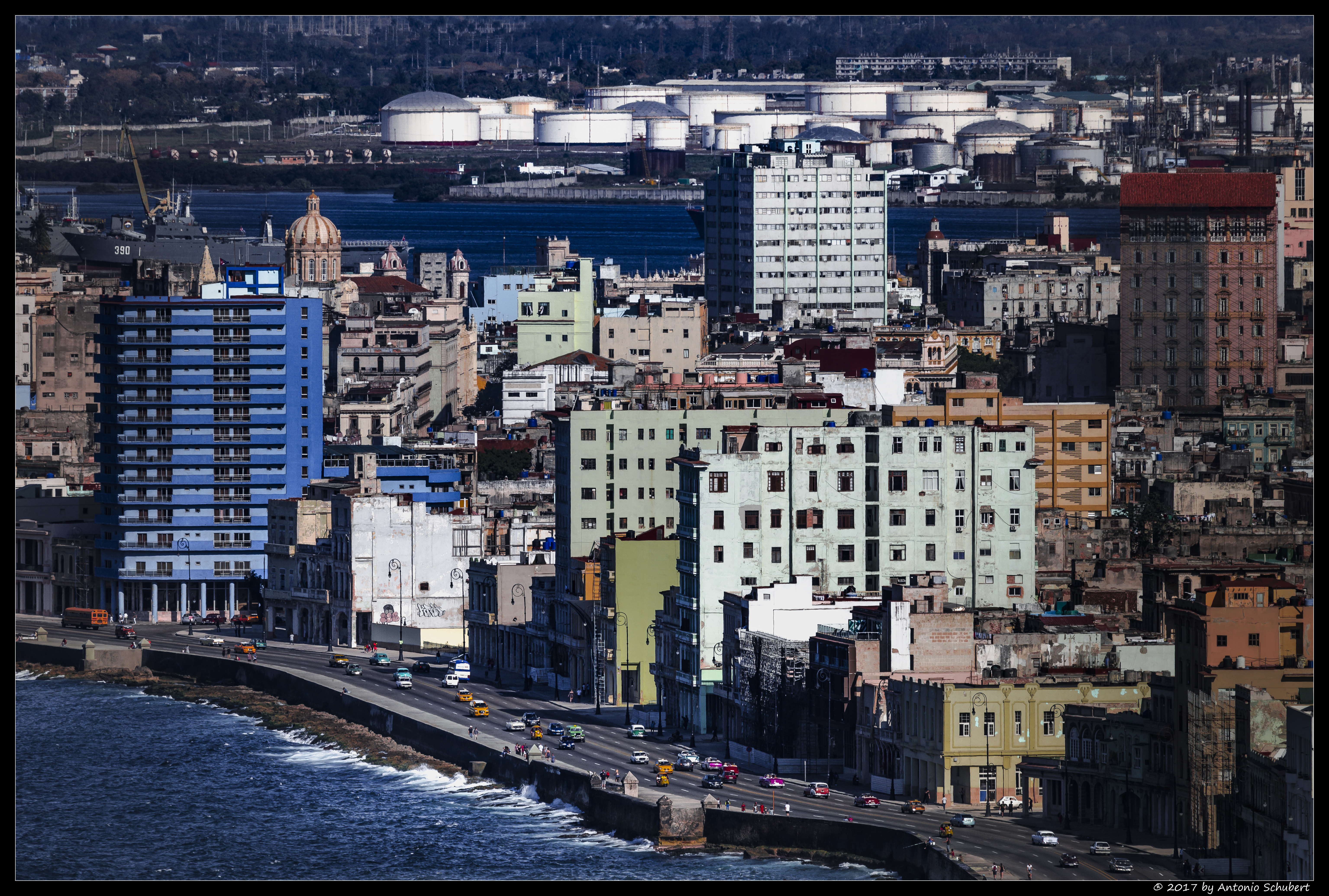 La Habana